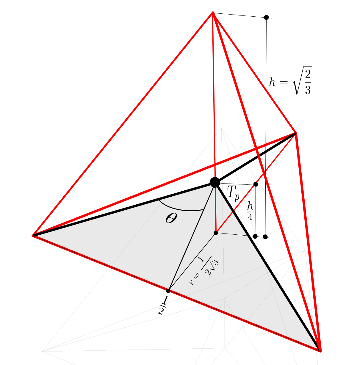 tetraeder med höjd, tyngdpunkt